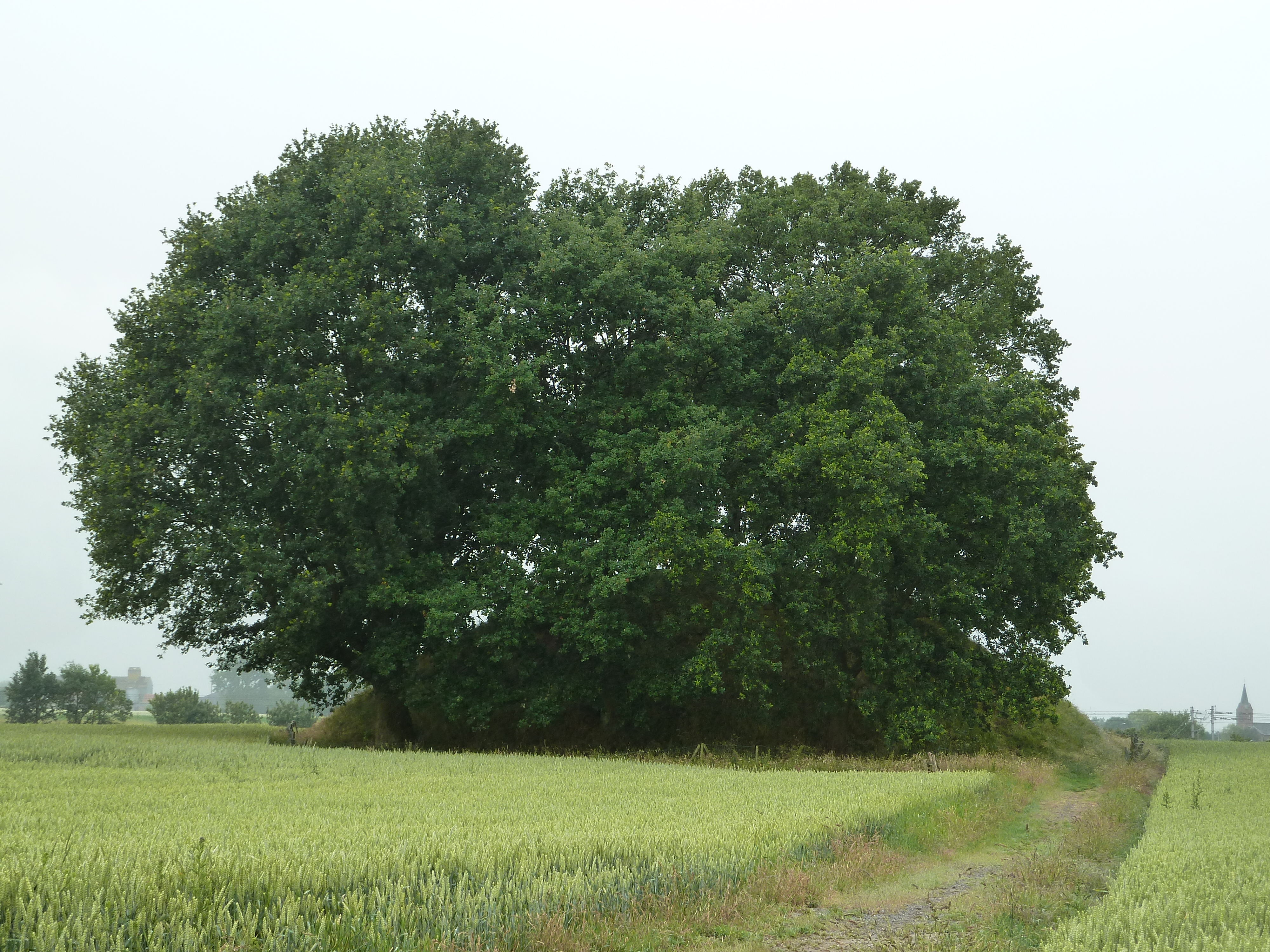 Avernassetombe, Gingelom, Belgique